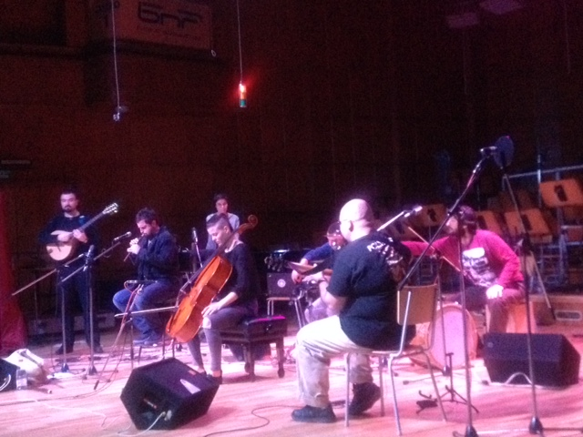 Кайно Йесно Слонце концерт Студио 1 на БНР, София, 22 март 2016 г.